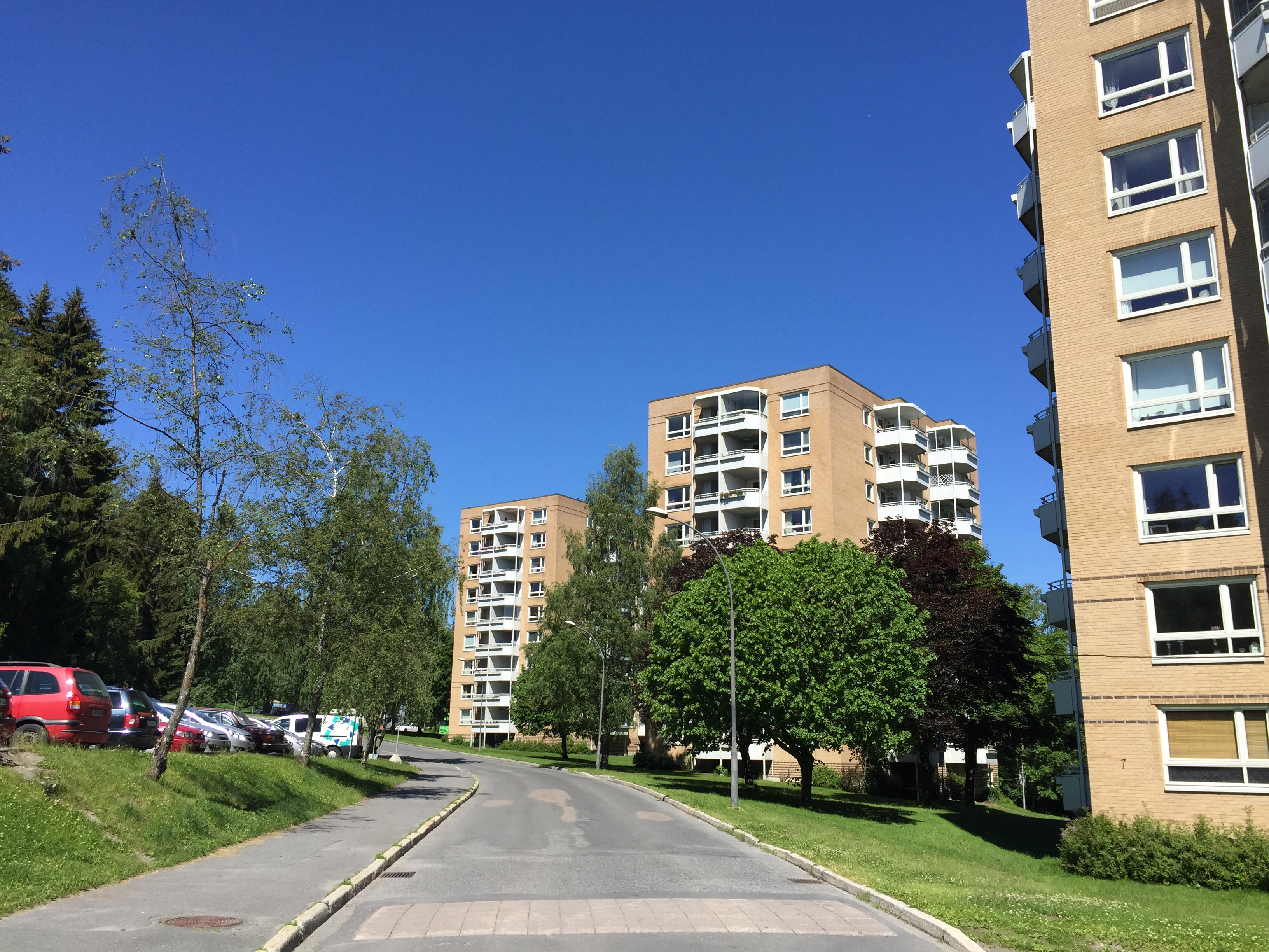 Henrik Sørensens vei i Oslo.